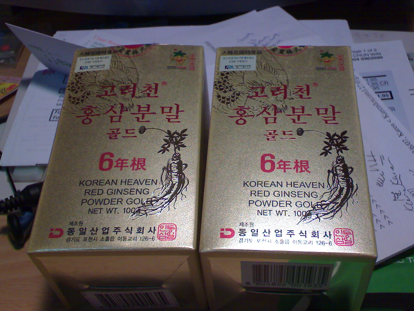 cost me 106 USD.